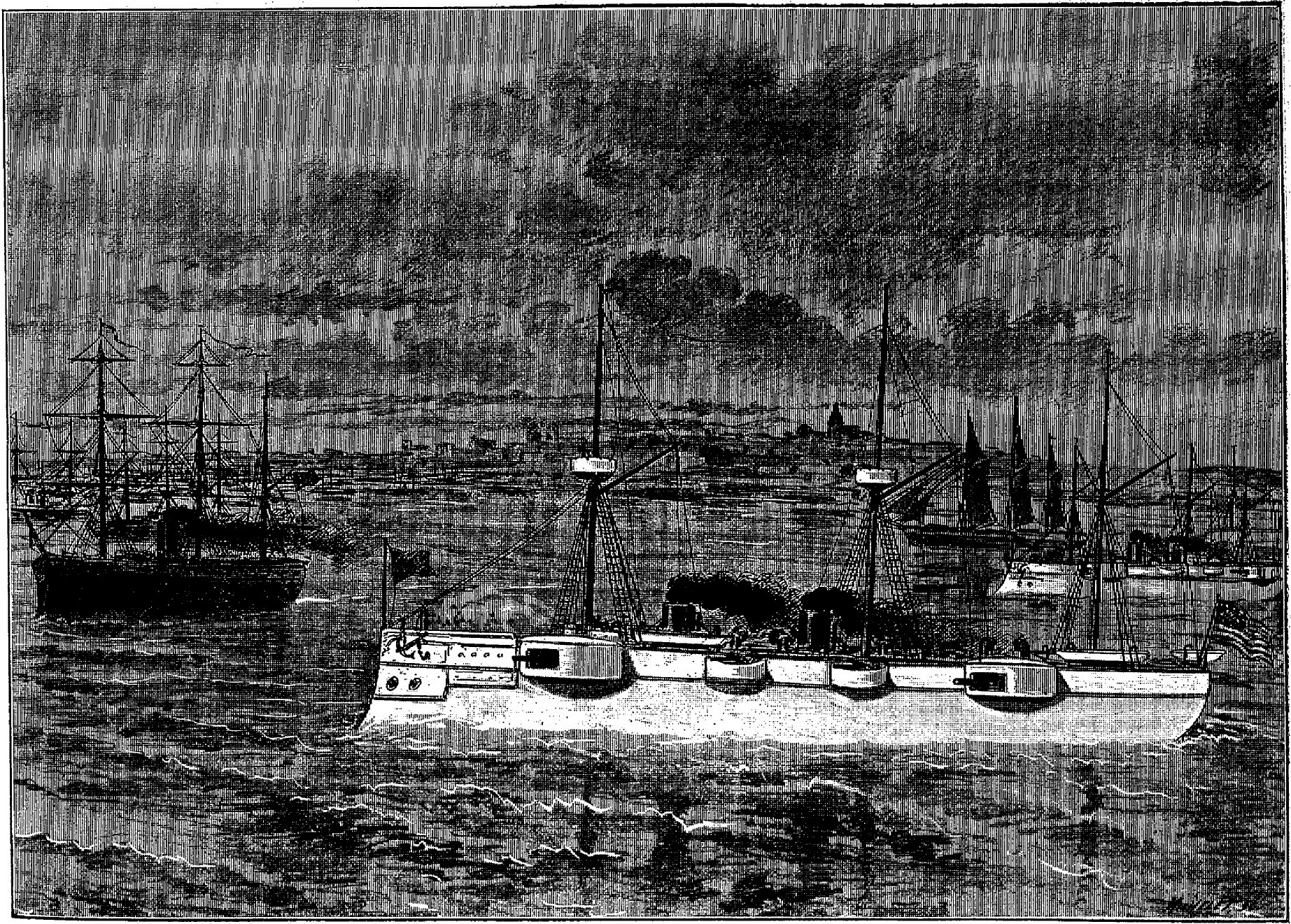 La Revolution au Brésil: Intervention armée dex États-Unis. Le Croiseur Le « Détroit » dans la Baie de Rio (Dessin de M. Bressler).